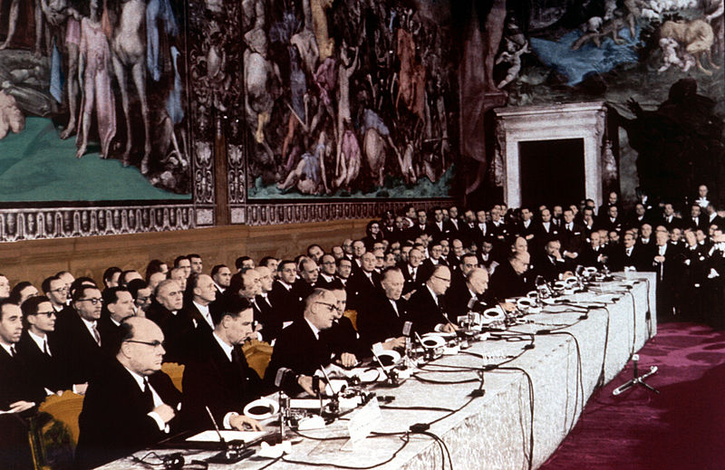 Римські угоди